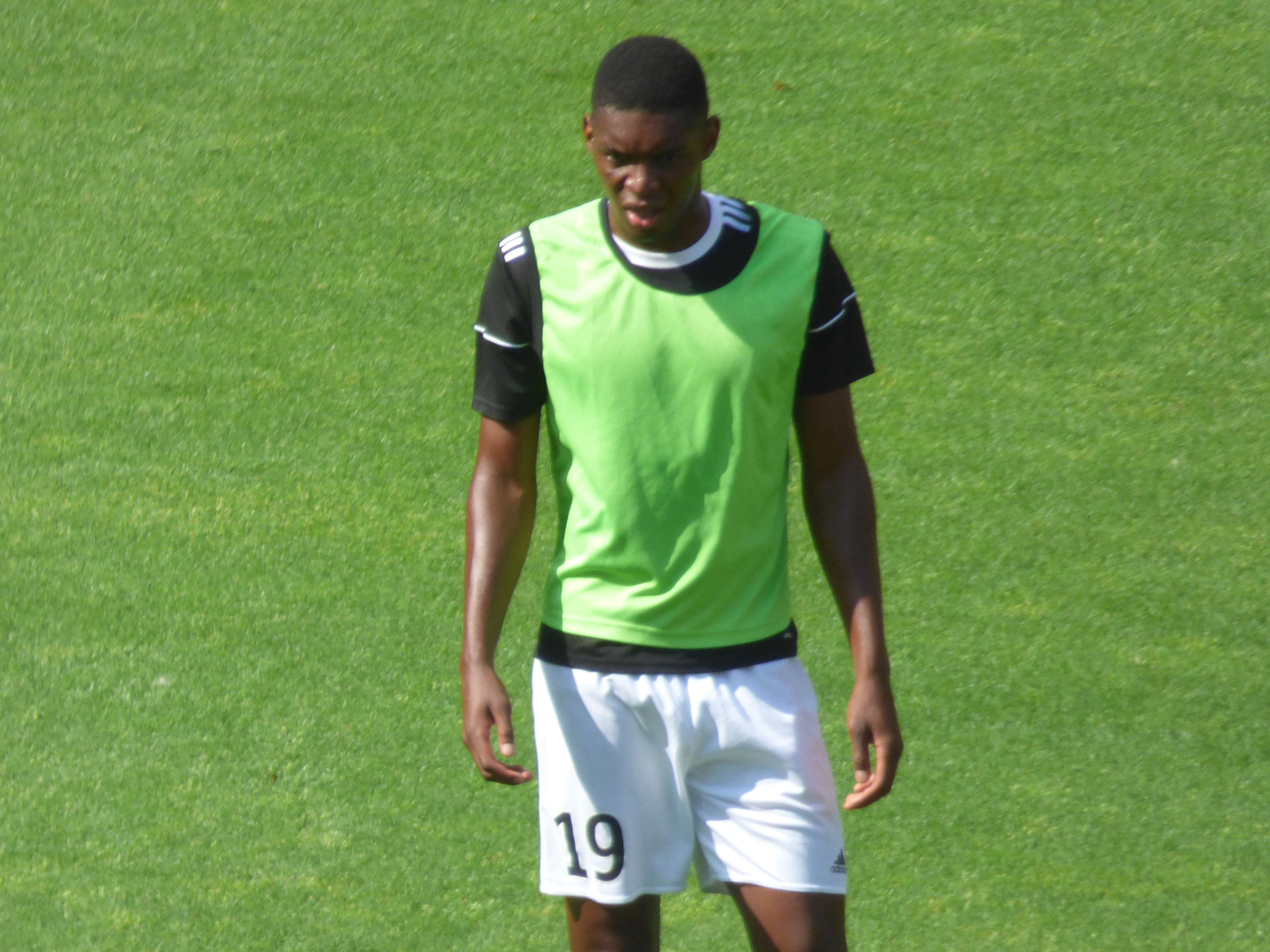 Formose Mendy avant le match RC Lens / Red Star, comptant pour la deuxième journée du championnat de France de Ligue 2 2018-2019 au Stade Bollaert-Delelis, le 4 août 2018.